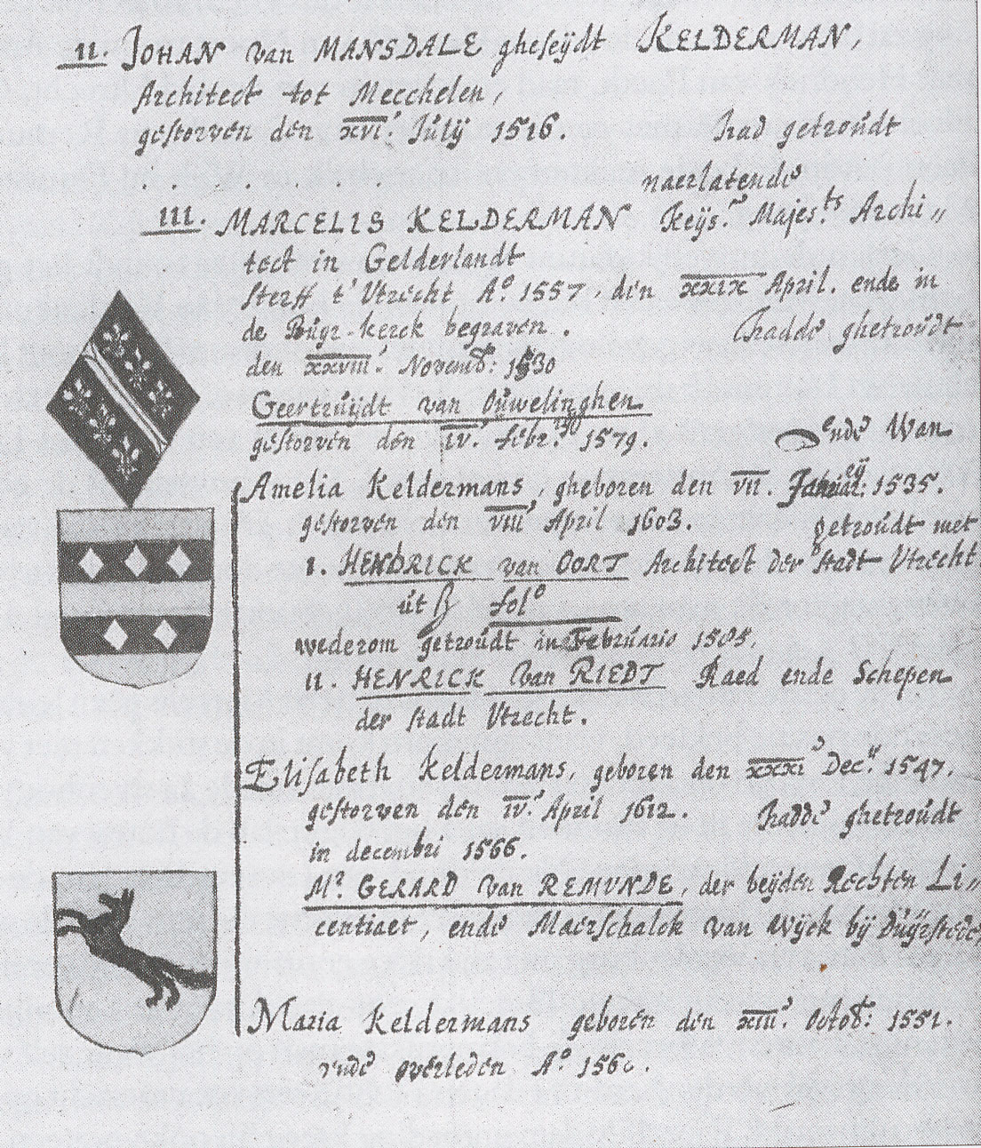 Marcelis Keldermans, onder meer bouwmeester van Kasteel Vredenburg te Utrecht rond 1540, in een handschrift van Cornelis Booth.